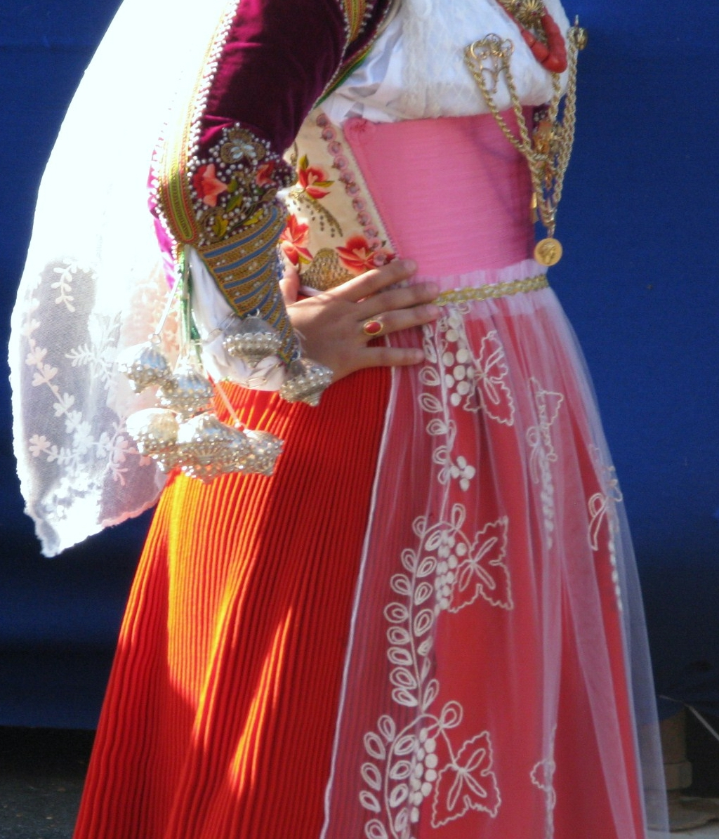 i ricchi bottoni di Ittiri